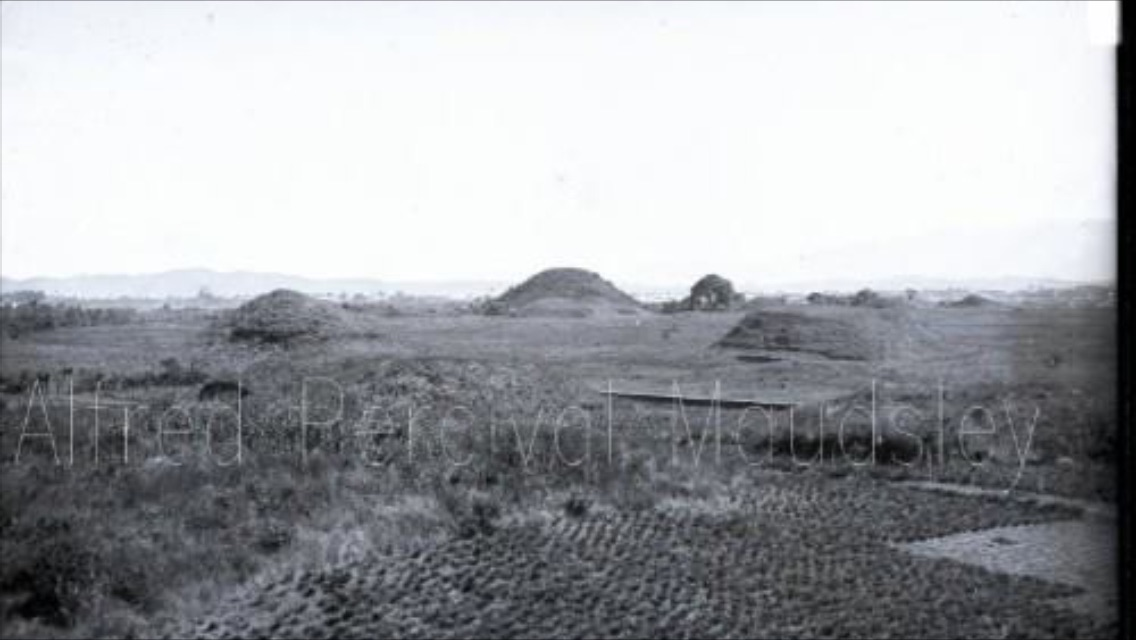 Kaminal Juyu maya site in the 1890s.